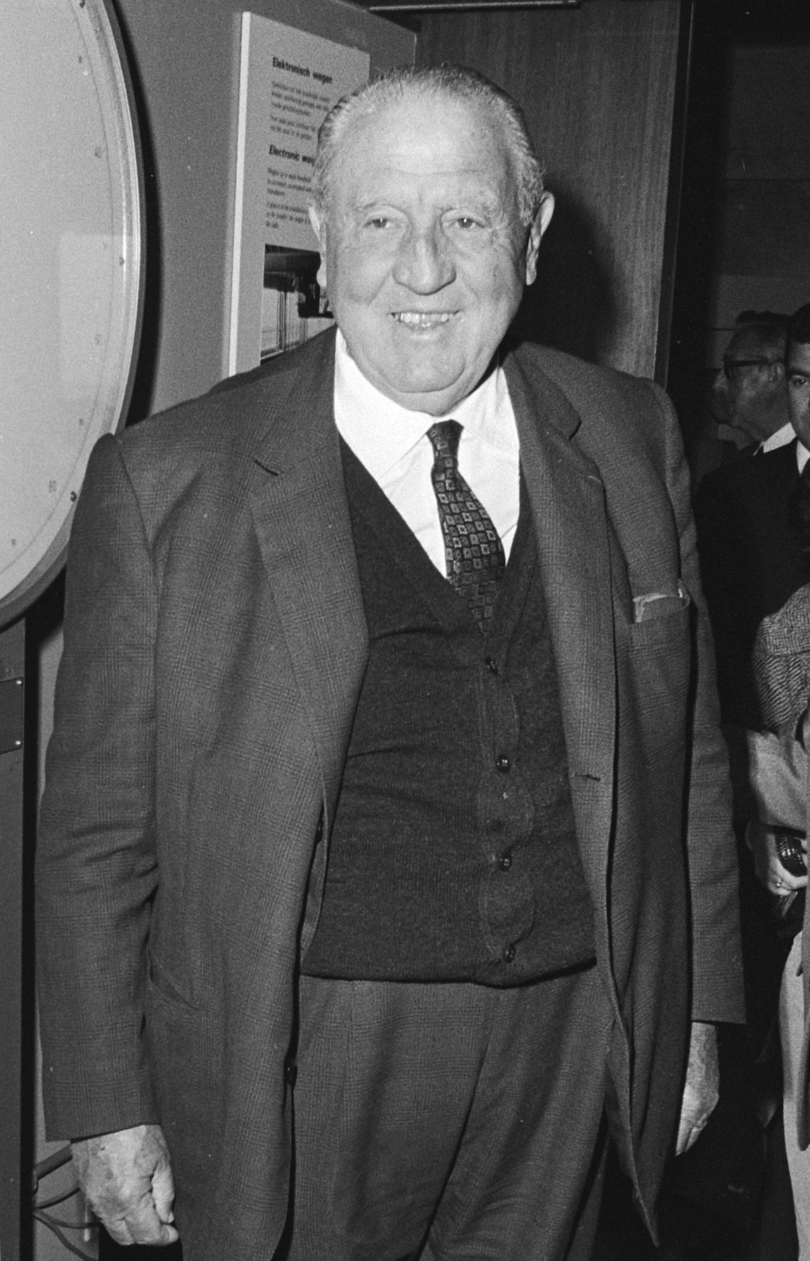 Santiago Bernabeu in Eindhoven.